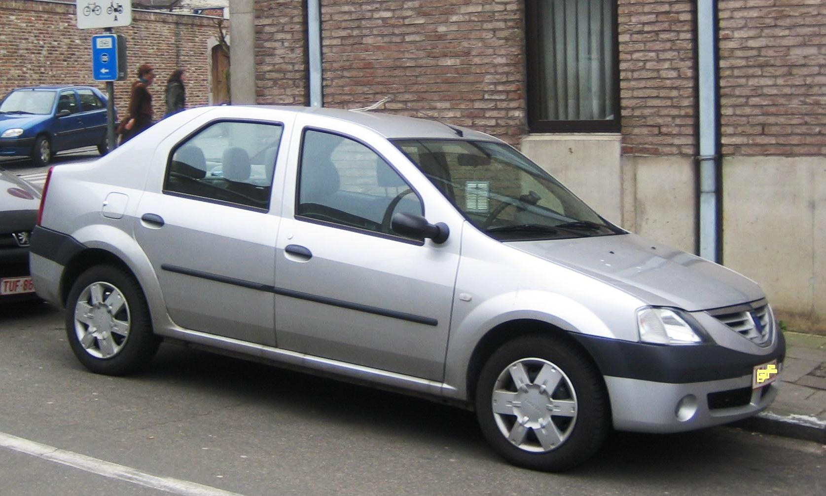 Dacia Logan Sedan St Trond